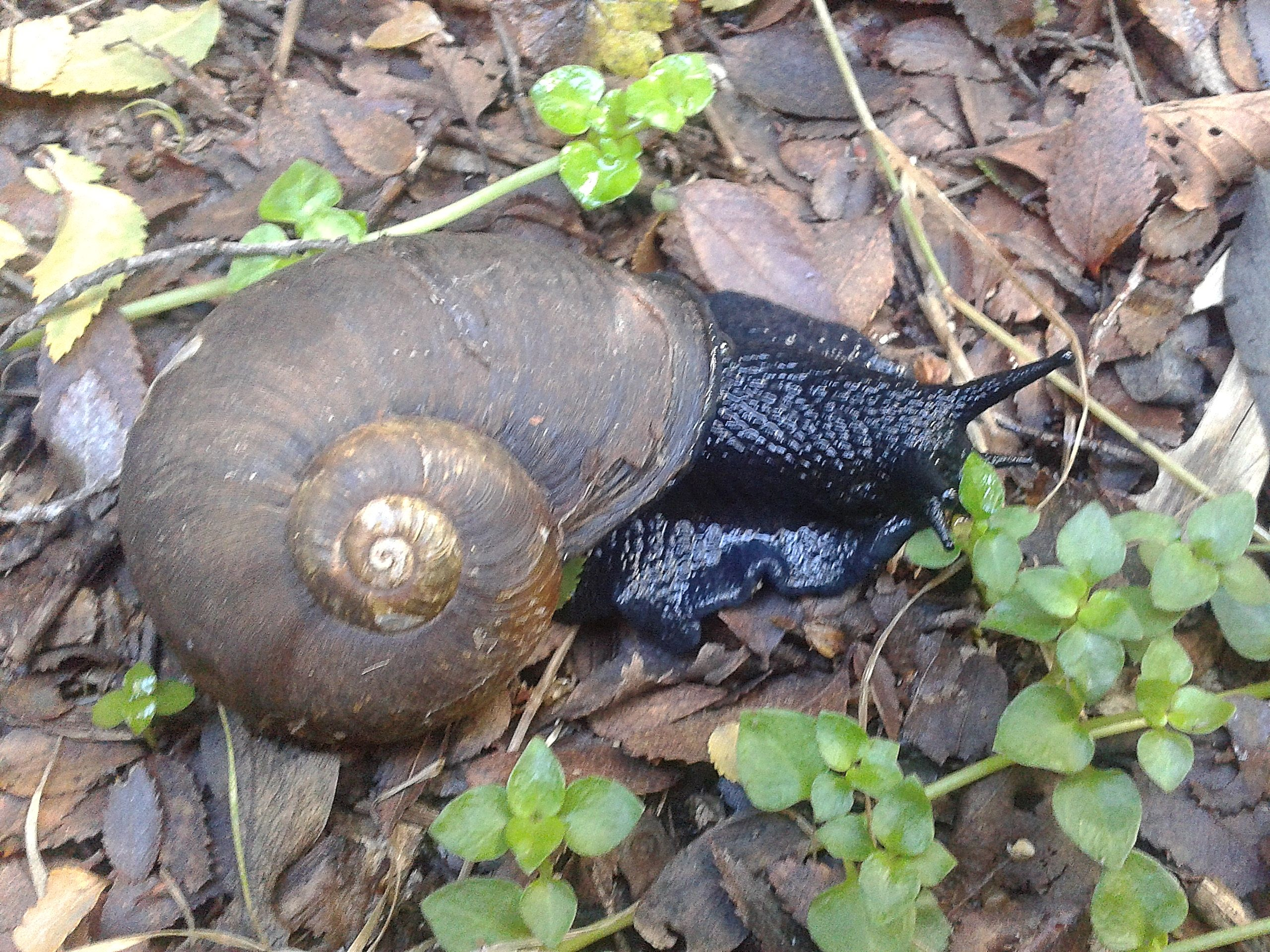 Caracol de bosque. Foto tomada en el camino a Curiñanco en bosque nativo cerca del km 5 del camino.